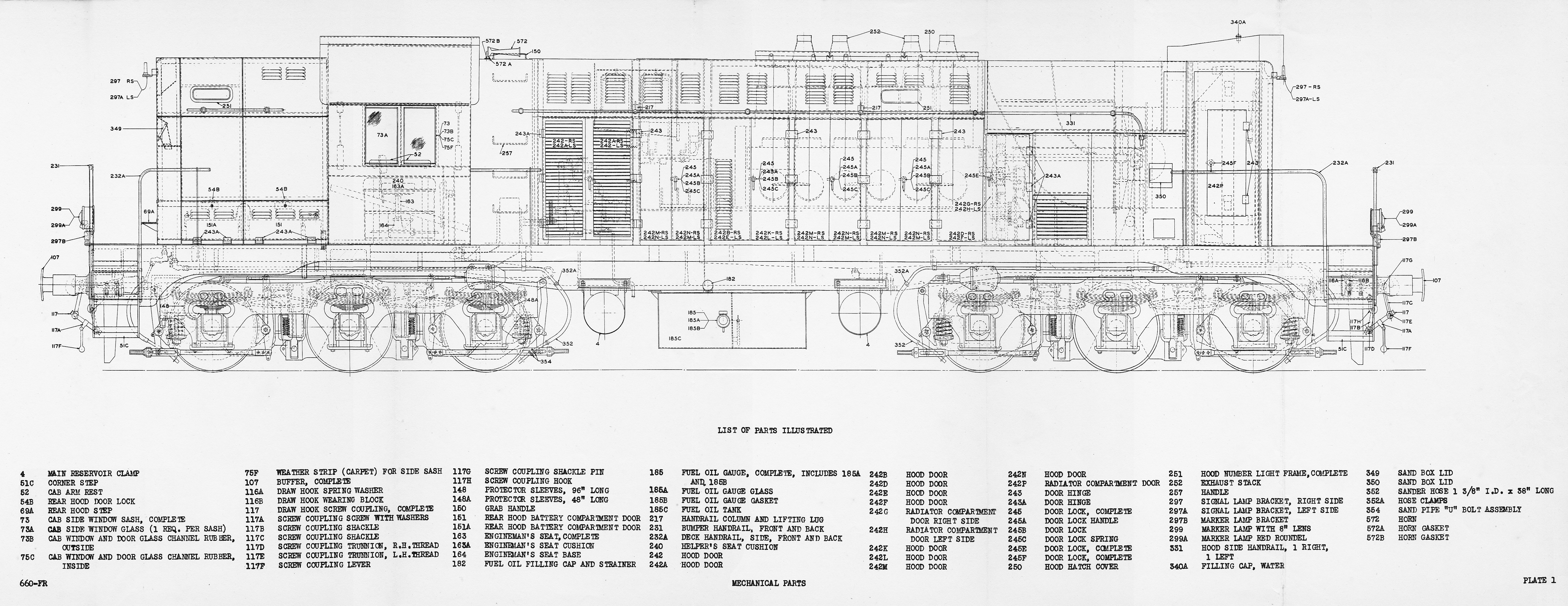 Dessin d'époque de la locomotive Diesel Baldwin DRS-6-4-660.